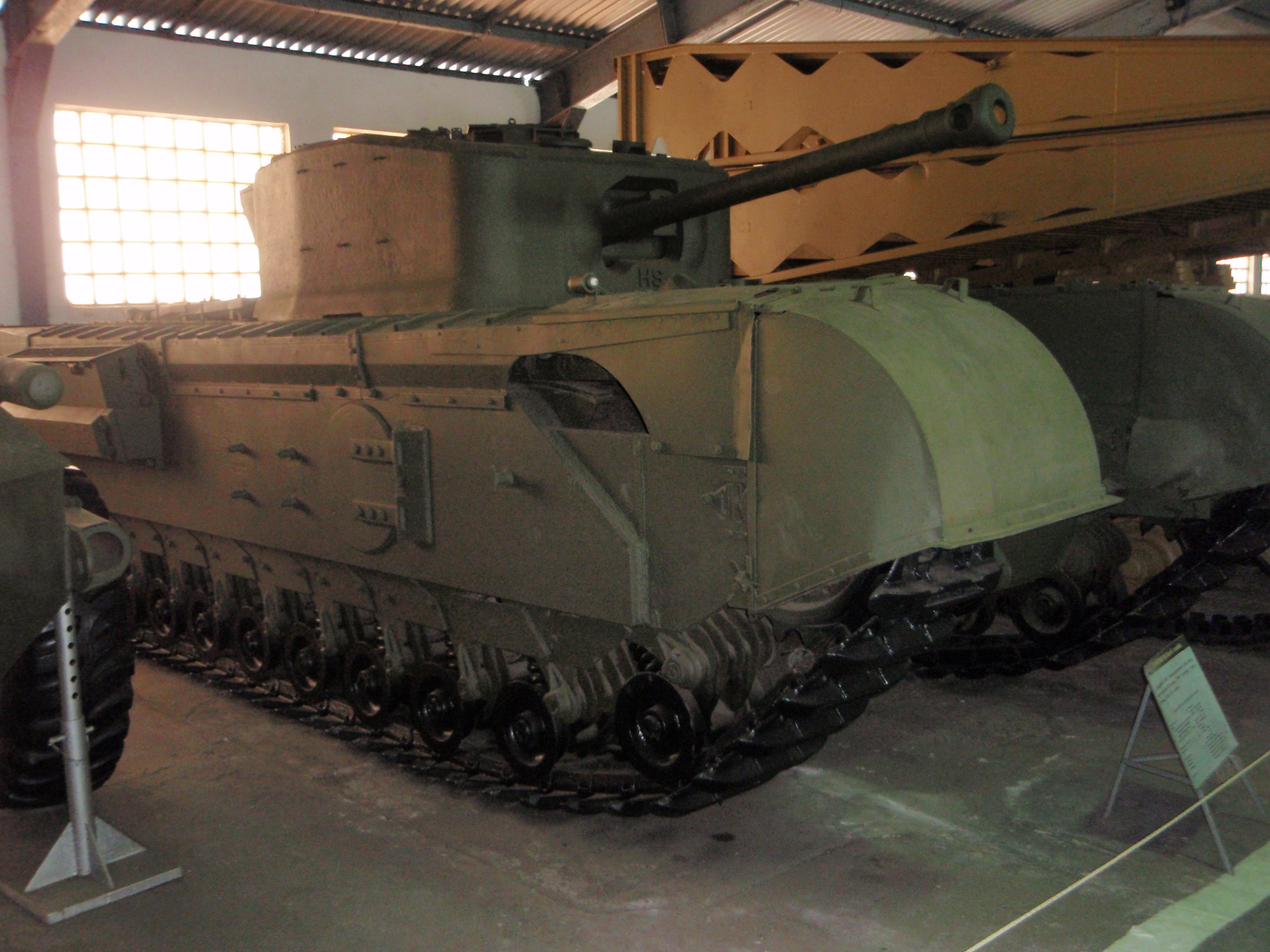 Британский тяжёлый огнемётный танк Mk.IV (Churchill-crocodile) в Кубинке